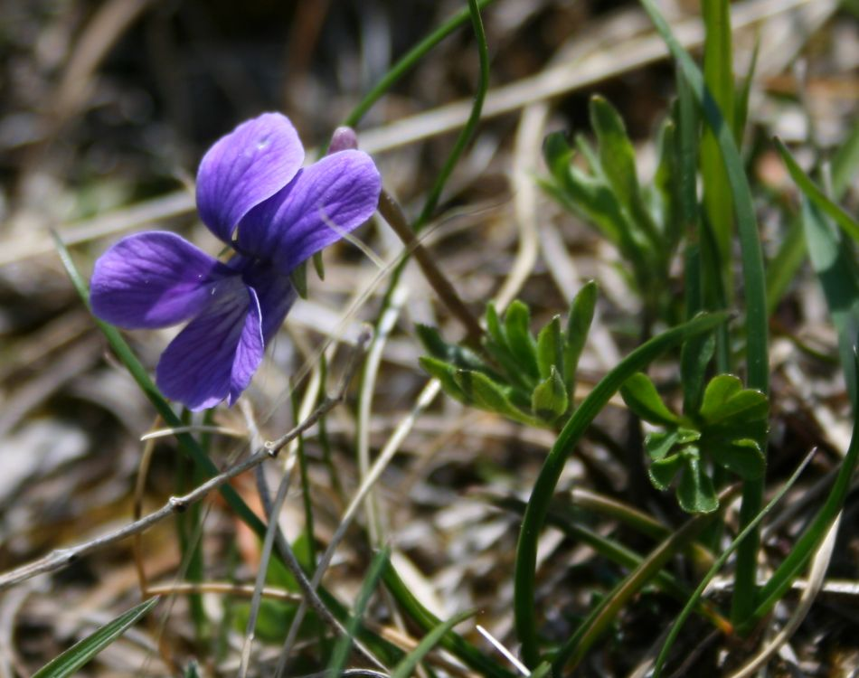 Viola pinnata, Veilchengewächse (Violaceae) - Slowenien/Slovenija/Slovenia: Trnovski gozd, Kucelj